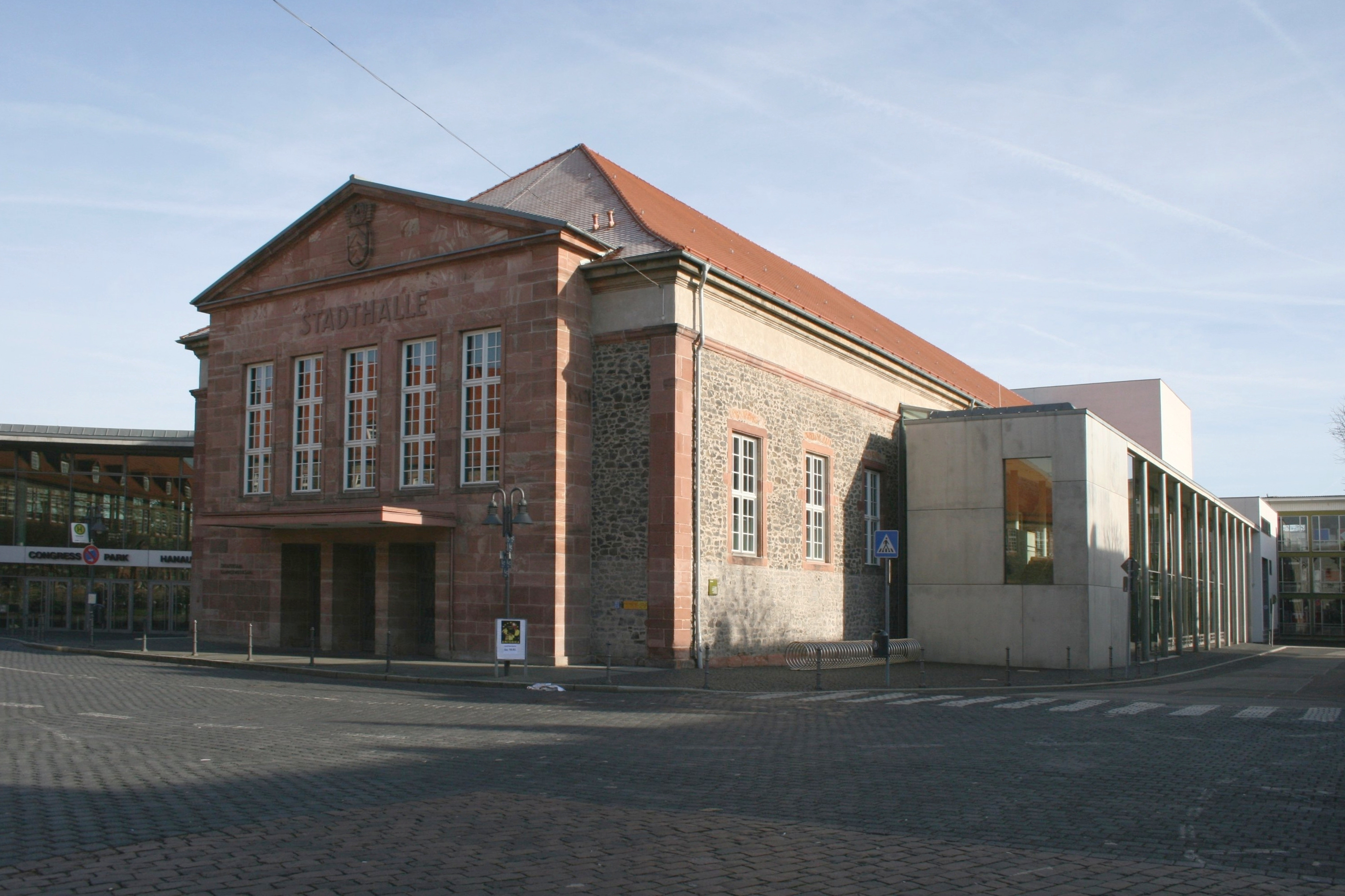 Stadtschloss Hanau, Ansicht des Marstalls von Süden.